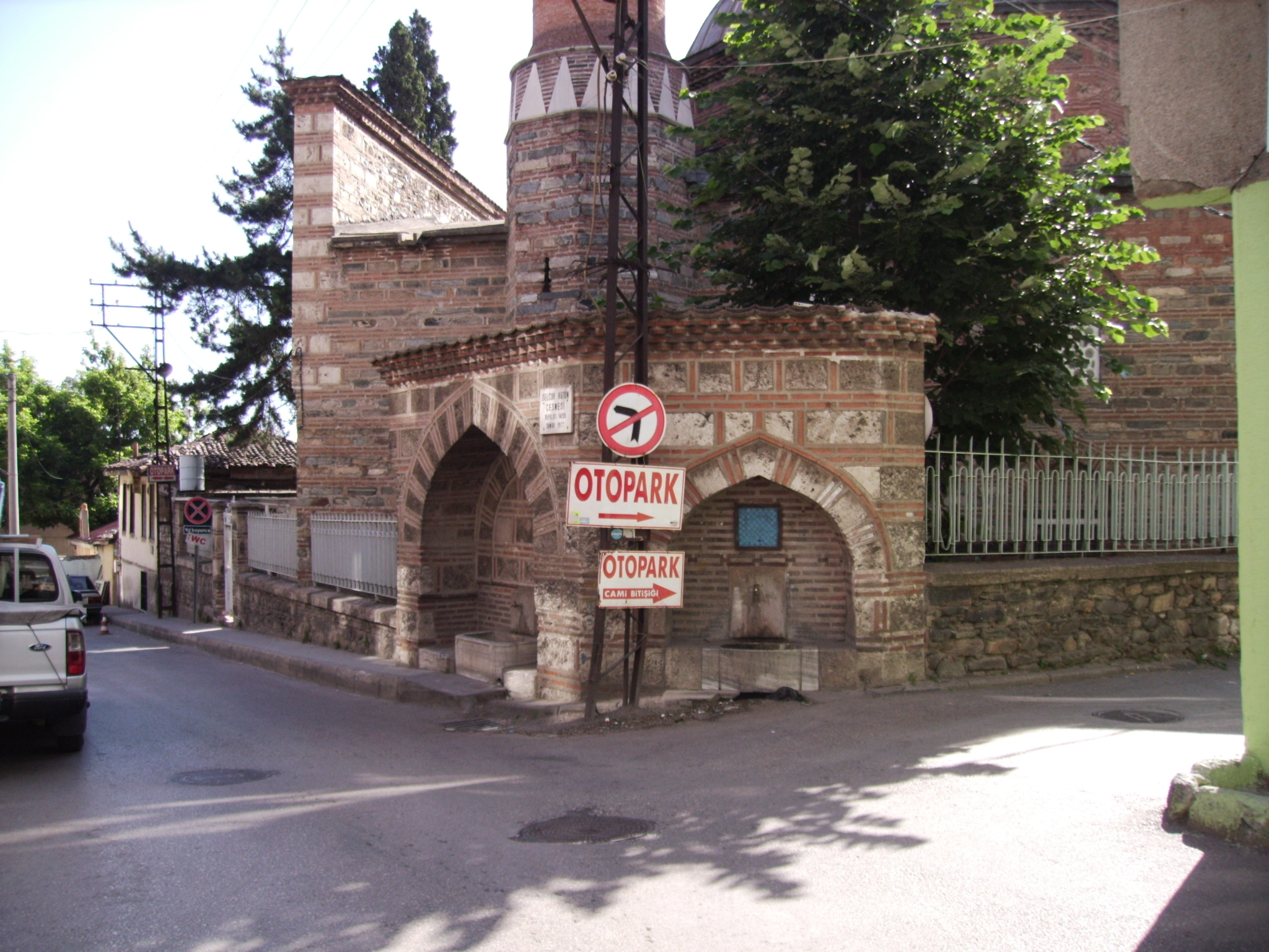 Selçuk Hatun Camii,BURSA